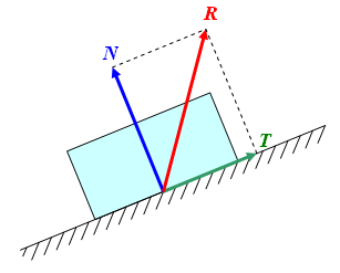 Décomposition d'une force Auteur : Bertrand Coconnier, réalisé avec Word + Paint. Licence GFDL Bertrand Coconnier